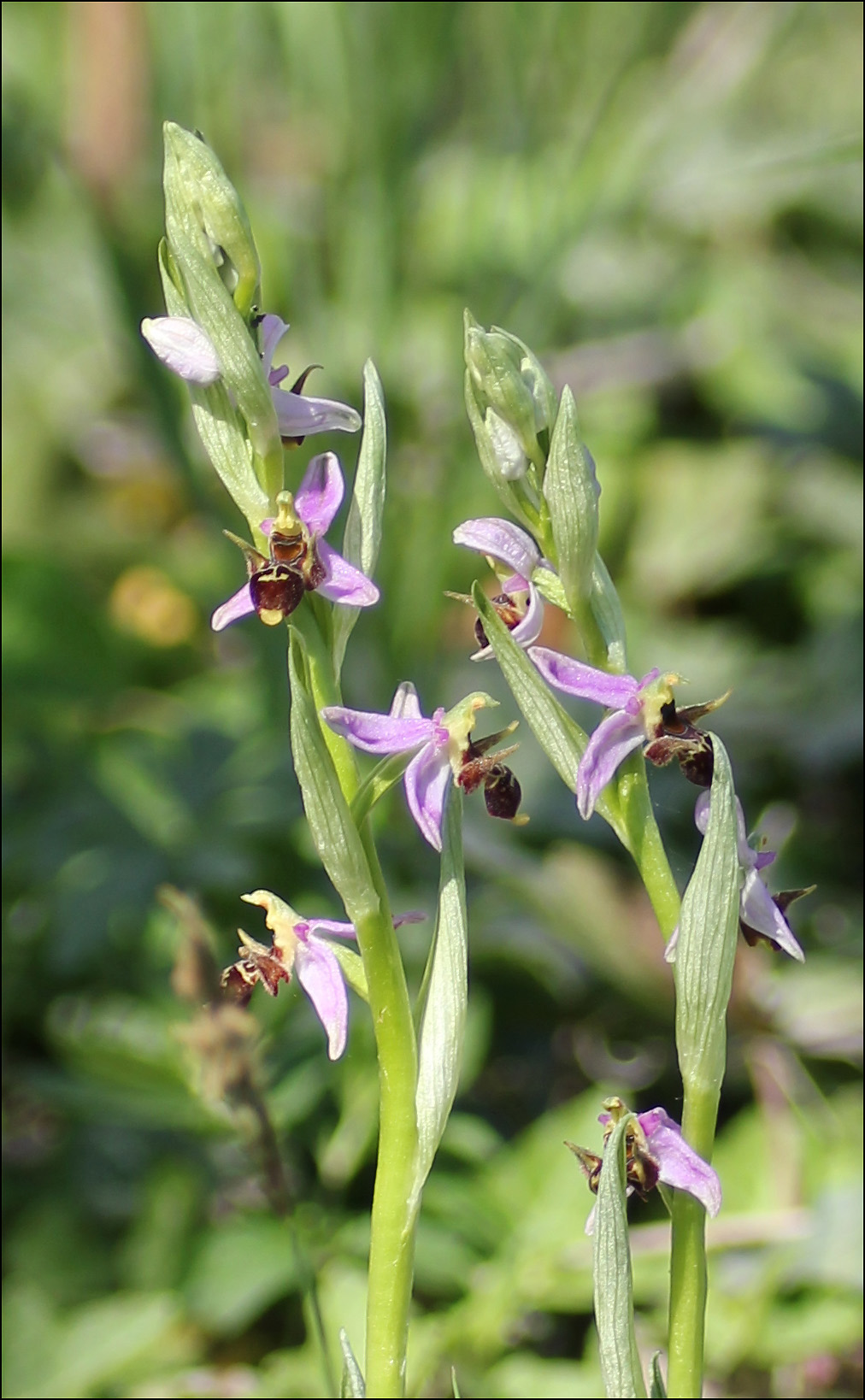 Фотография офрис оводоносной, редкой средиземноморской реликтовой орхидеи. Окрестности Суджукской лагуны, Новороссийск, 3 мая 2012 г.